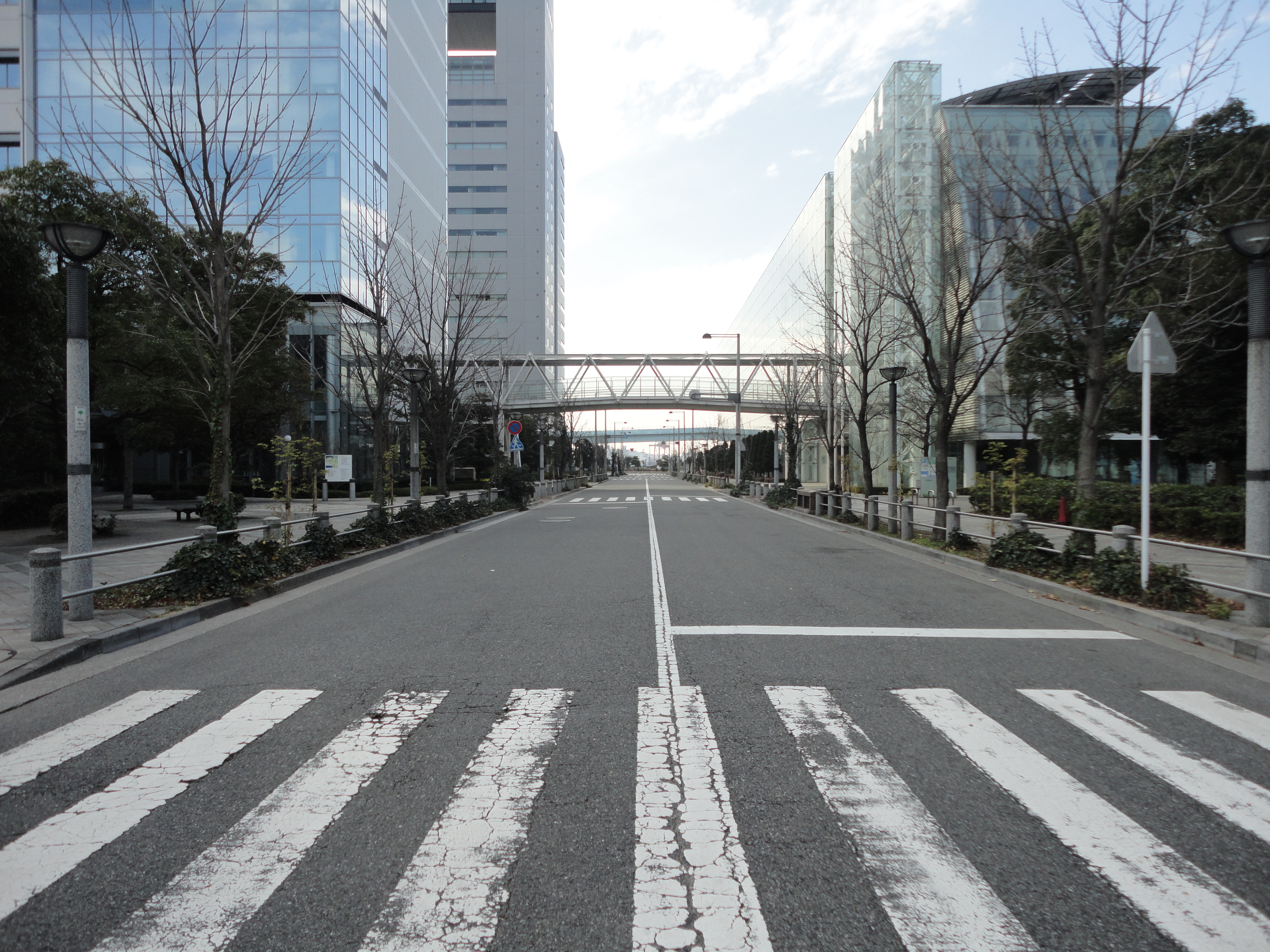 青海